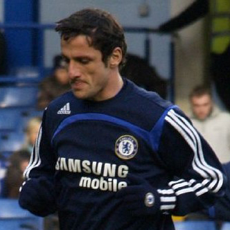 Juliano Belletti